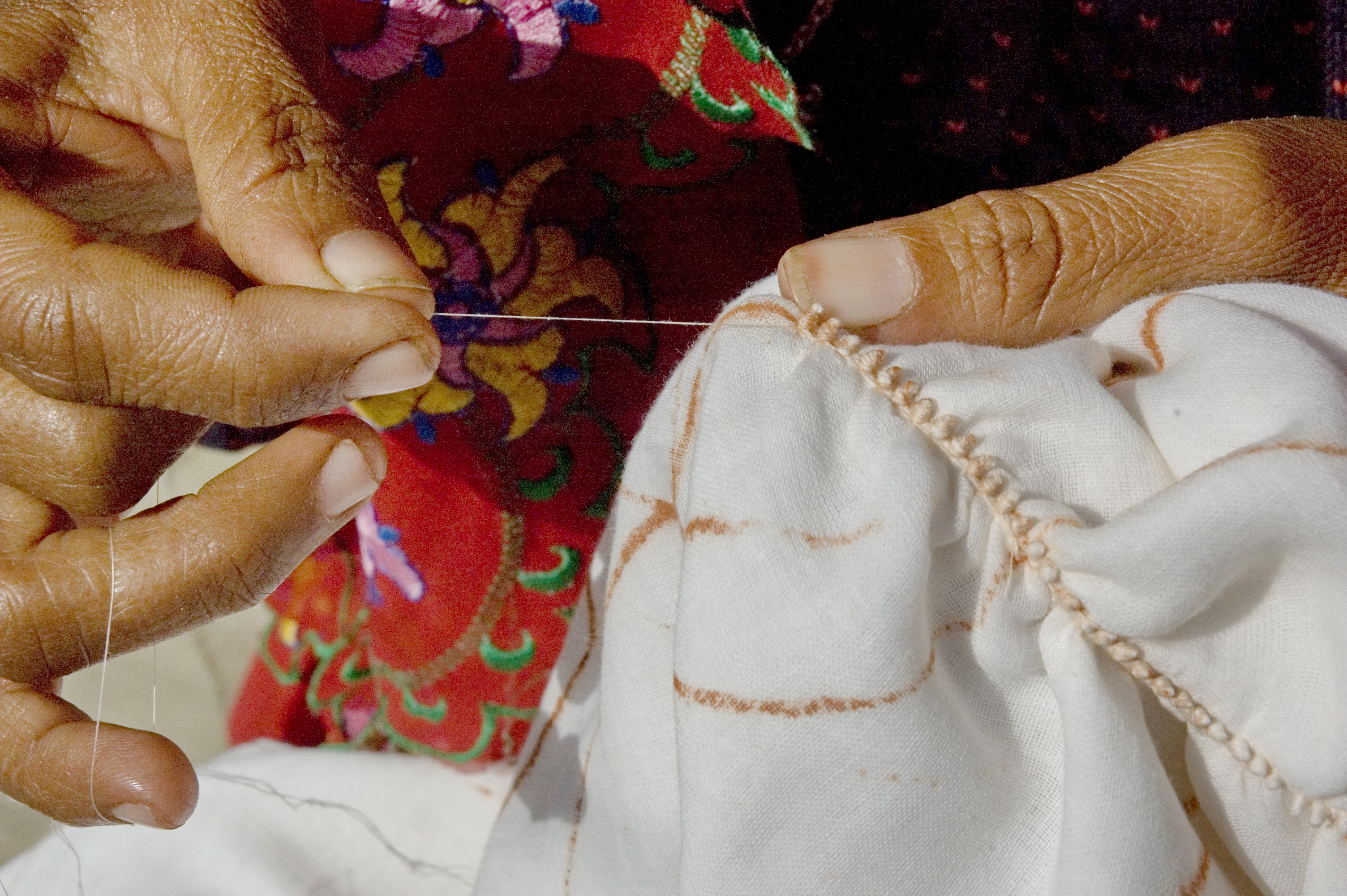 Mit feinen Fäden werden die nicht zu färbenden Punkte abgebunden